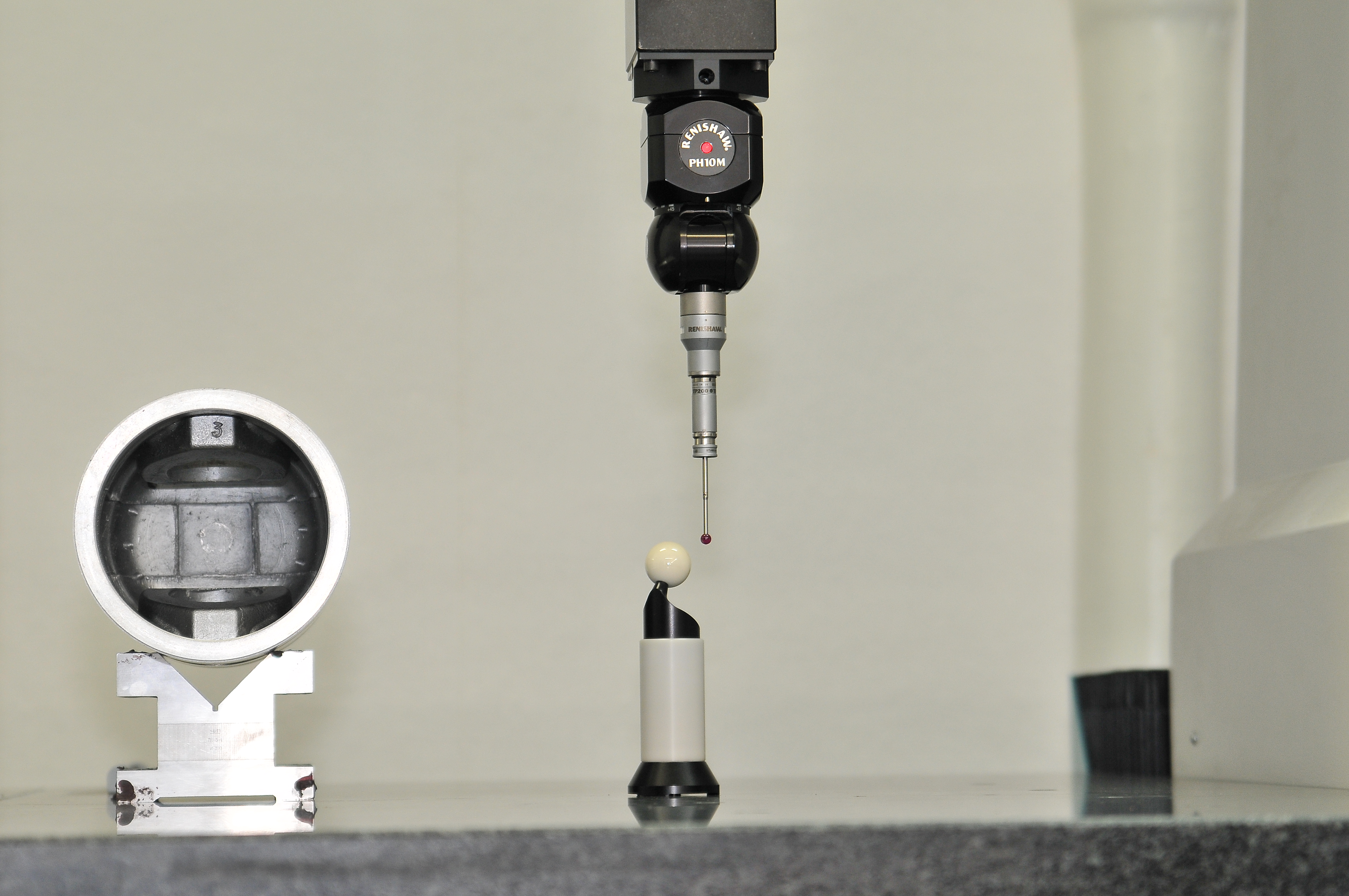 Проверка геометрии поршня на трёхкоординатной мшине